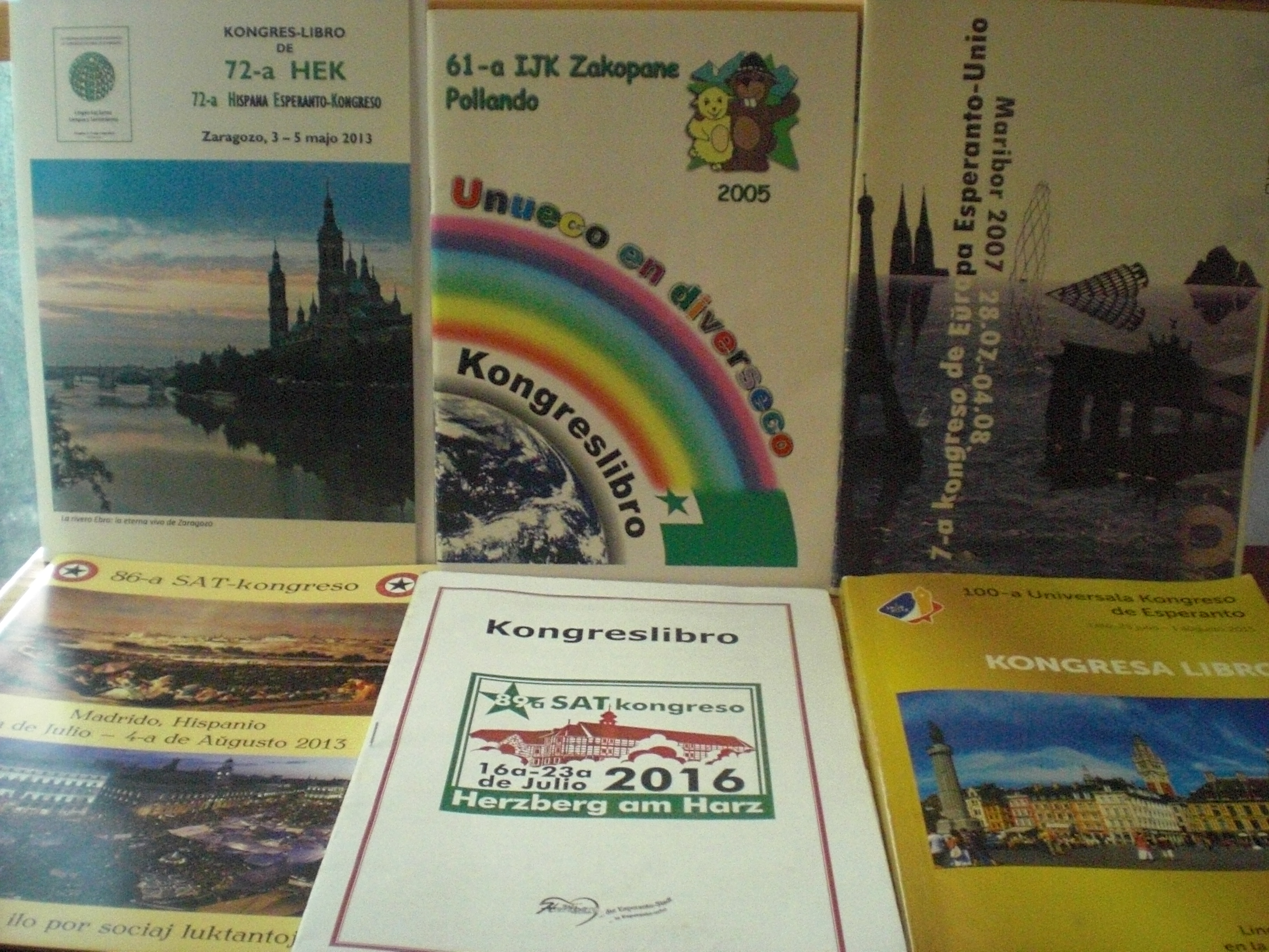 kongreslibroj